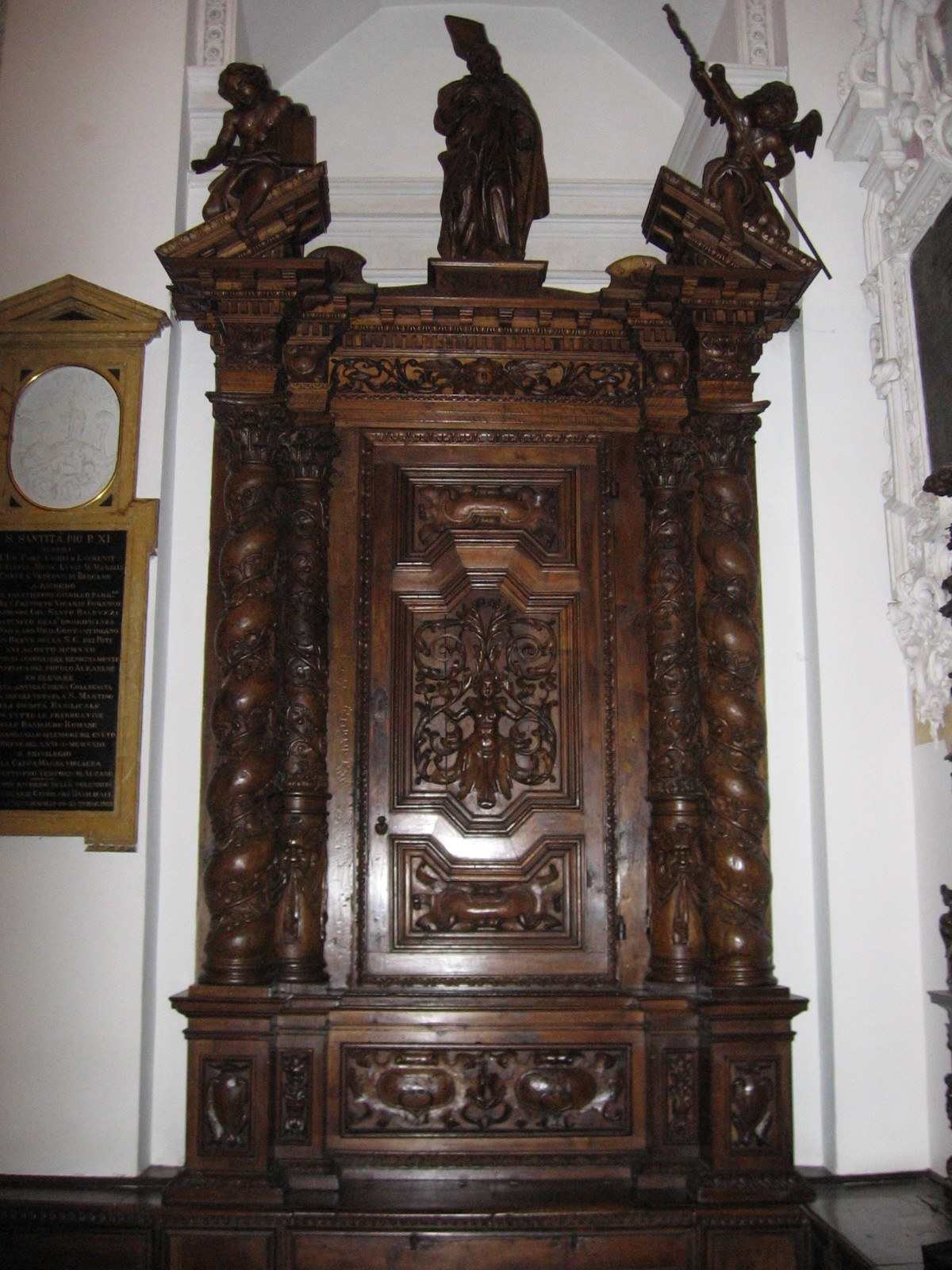 Museo le Sagrestie, Alzano Lombardo, BG (ITALIA)